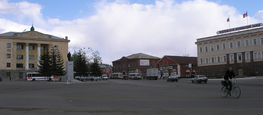 Votkinsk - foto van het centrum van Votkinsk